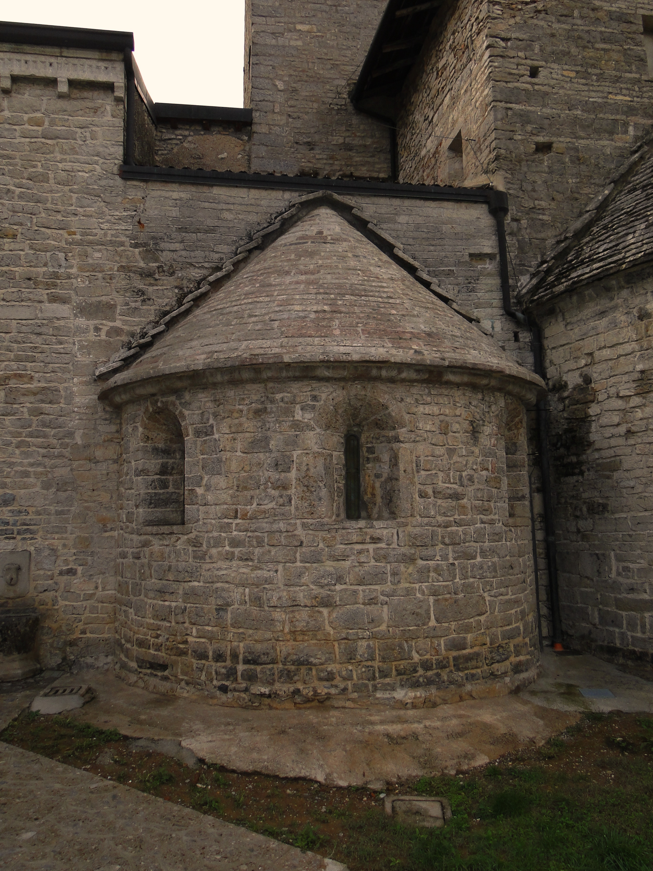 Abbazia san Benedetto in Vallalta, Abbazia di Albino (BG). Abside con navata destra della chiesa